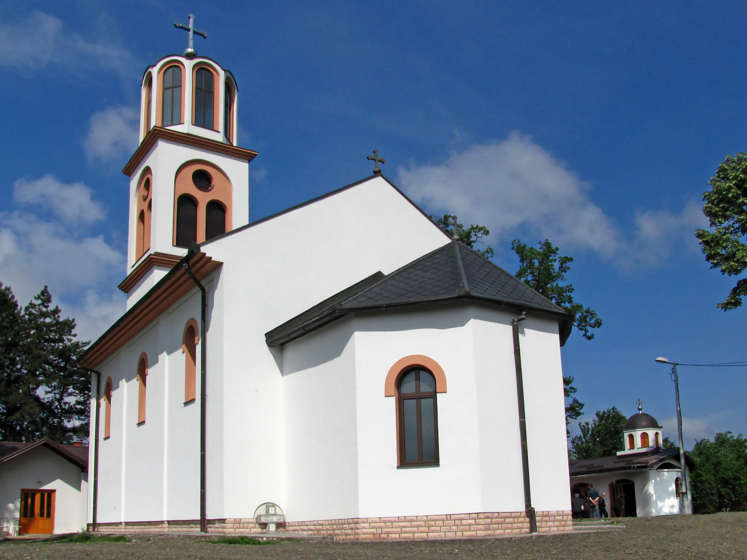 Црква Рођења Пресвете Богородице у Чечави